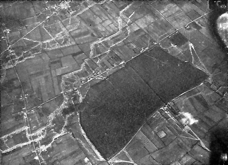 Fliegerbld der Regimentsstellung bei Neuve-Chapelle, März 1915 - März 1916